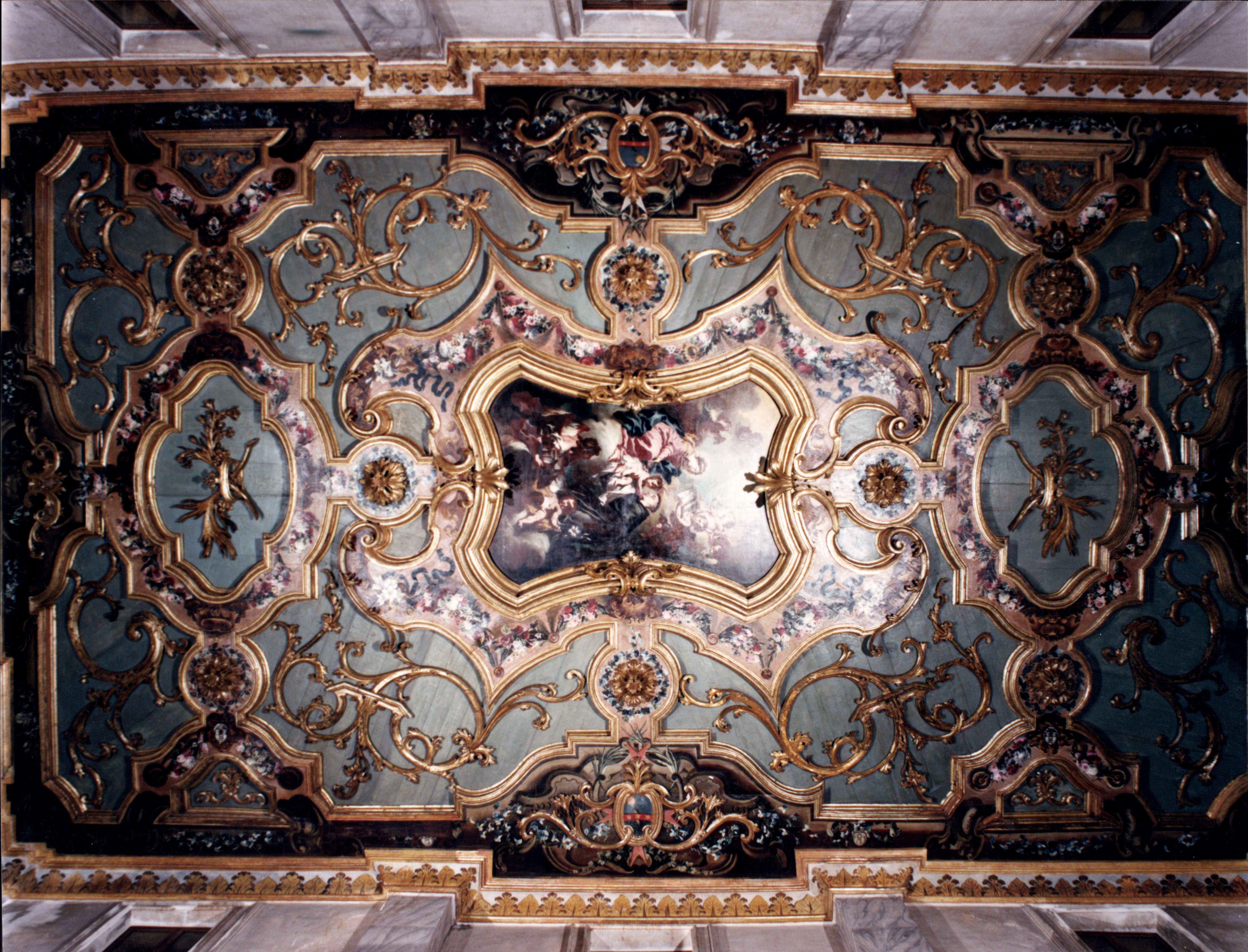 Soffitto di Ferdinando Mosca da Pescocostanzo (XVIII secolo) nell'Oratorio di Sant'Antonio dei Cavalieri de Nardis, via San Marciano, L'Aquila.